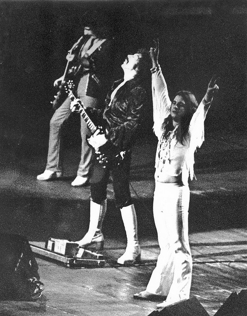 Black Sabbath 1977 yılında Madison Square Garden'dayken